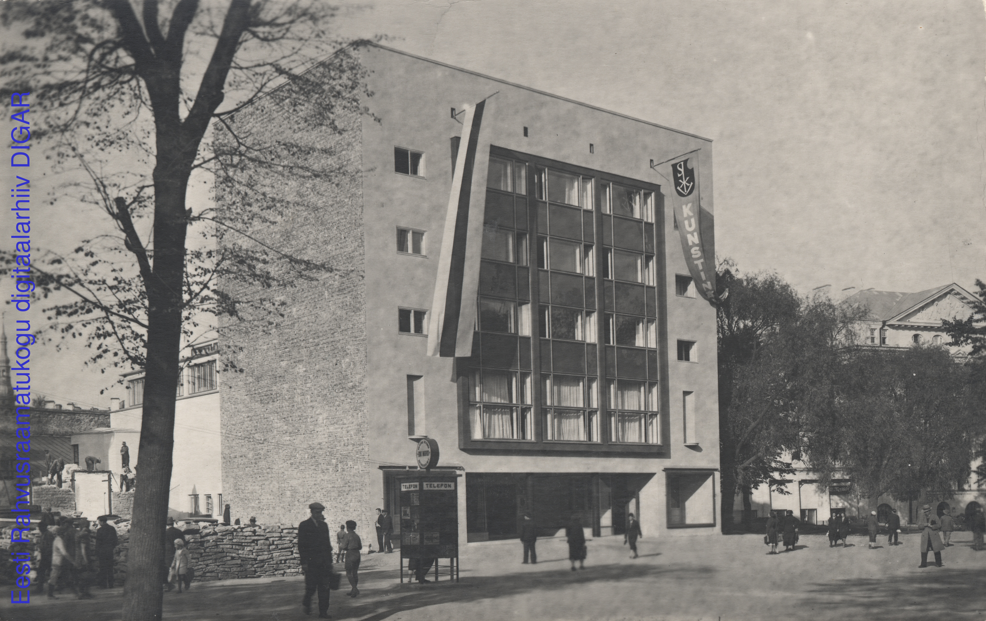 Eesti Rahvusraamatukogu pildikogu, Pk Tallinn 27/26